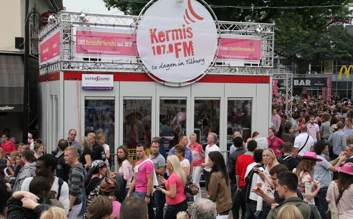 De Studio van Kermis FM in 2011 op Roze Maandag